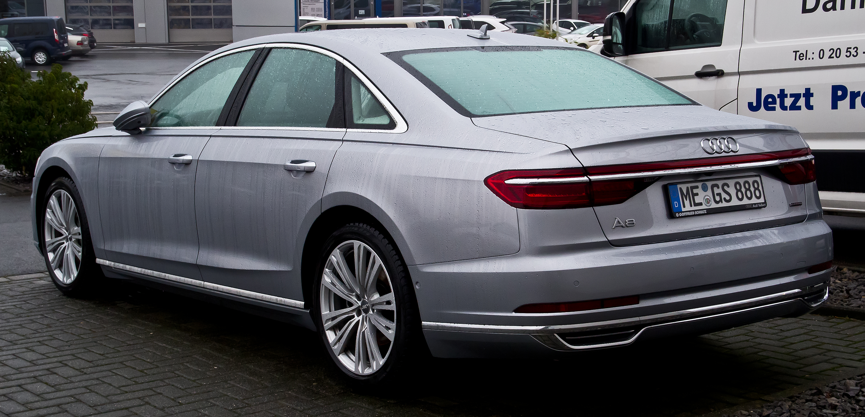 Audi A8 50 TDI (D5)